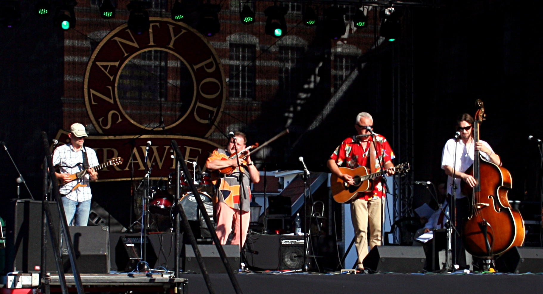 Szanty pod Żurawiem w Gdańsku, zespół EKT Gdynia